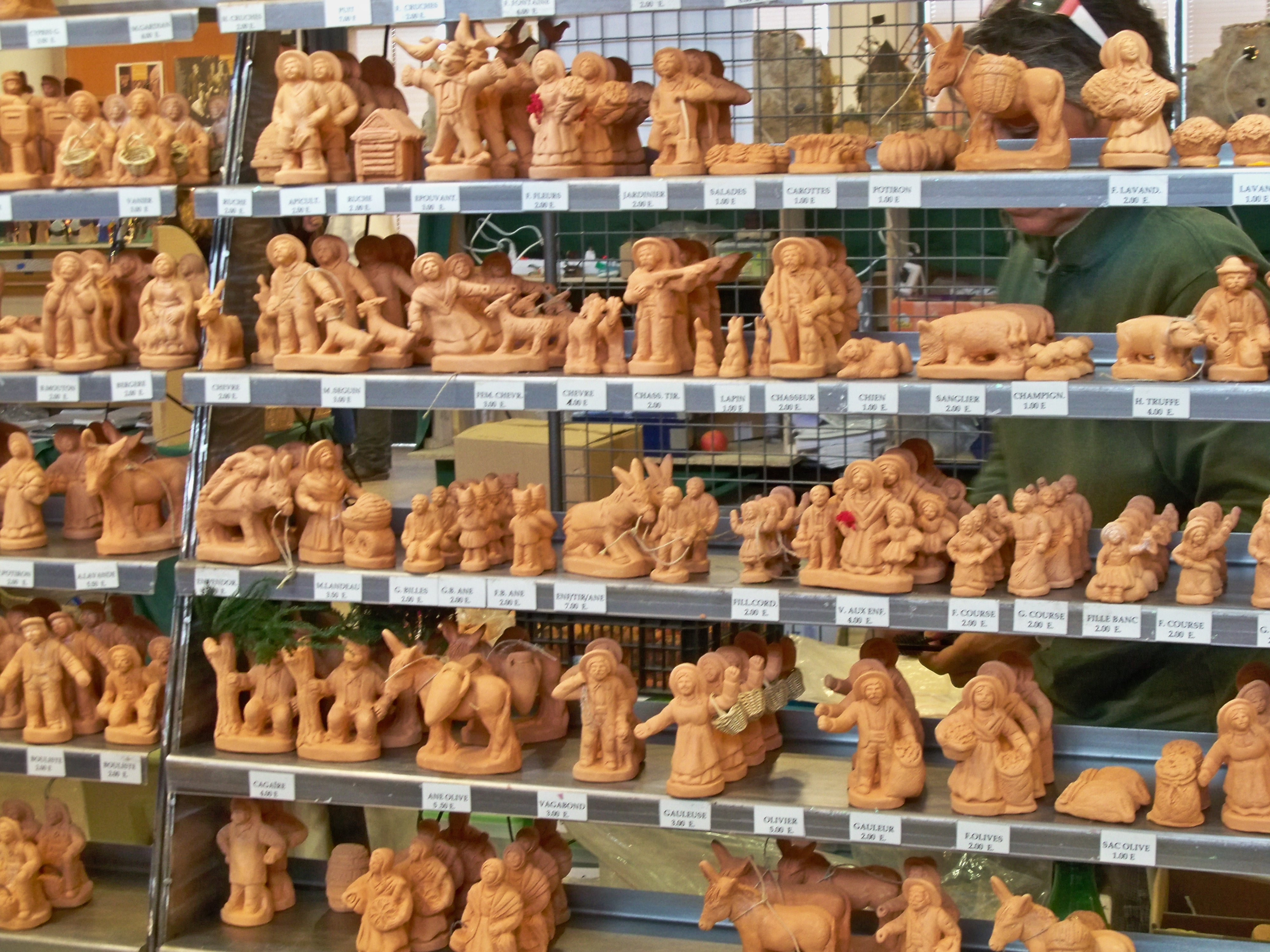 Santons à peindre en vente à la foire aux santons du marché de noël de Fontvieille, Bouches du Rhone, France